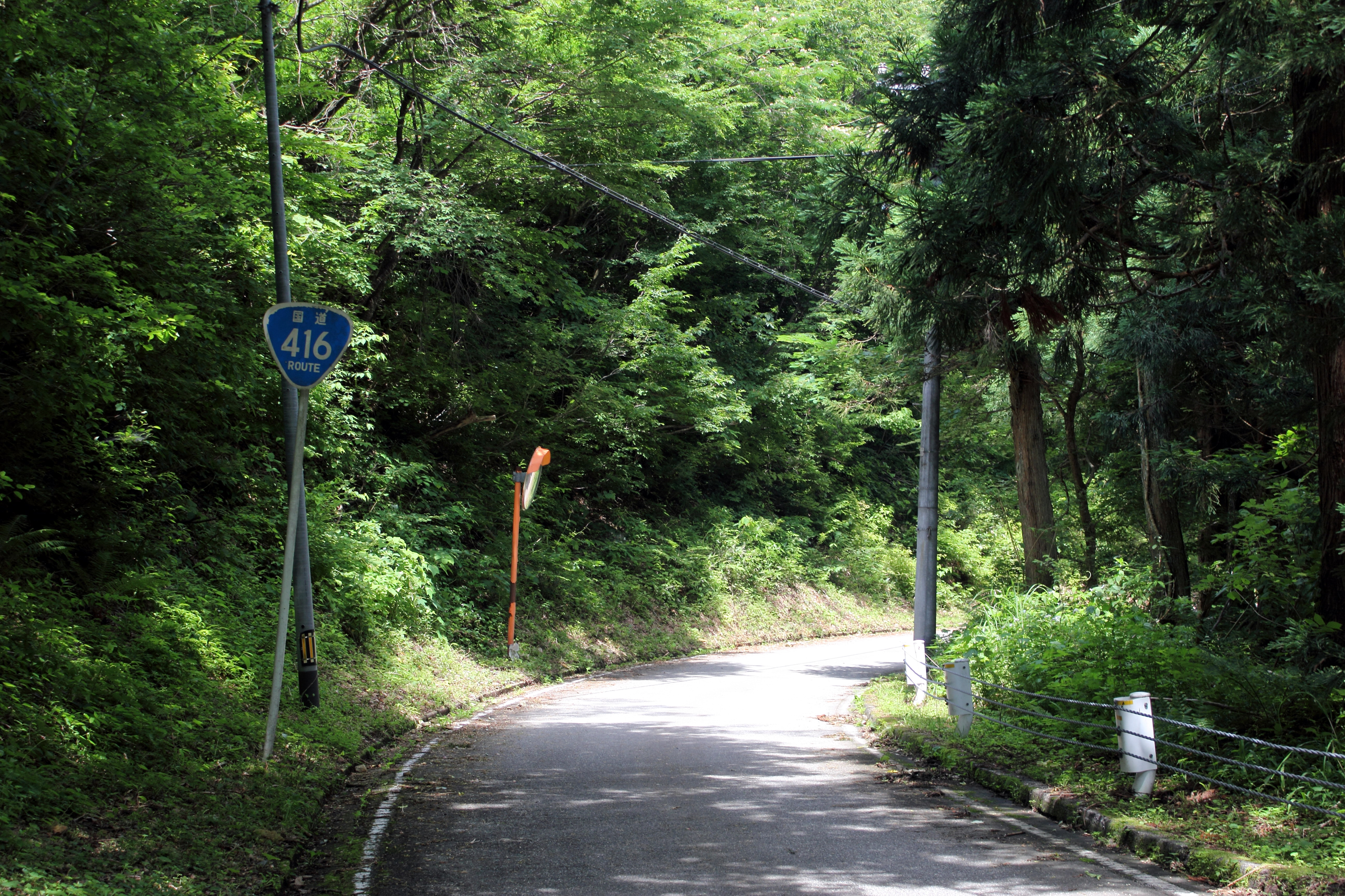 国道416号線 牛ヶ首峠付近